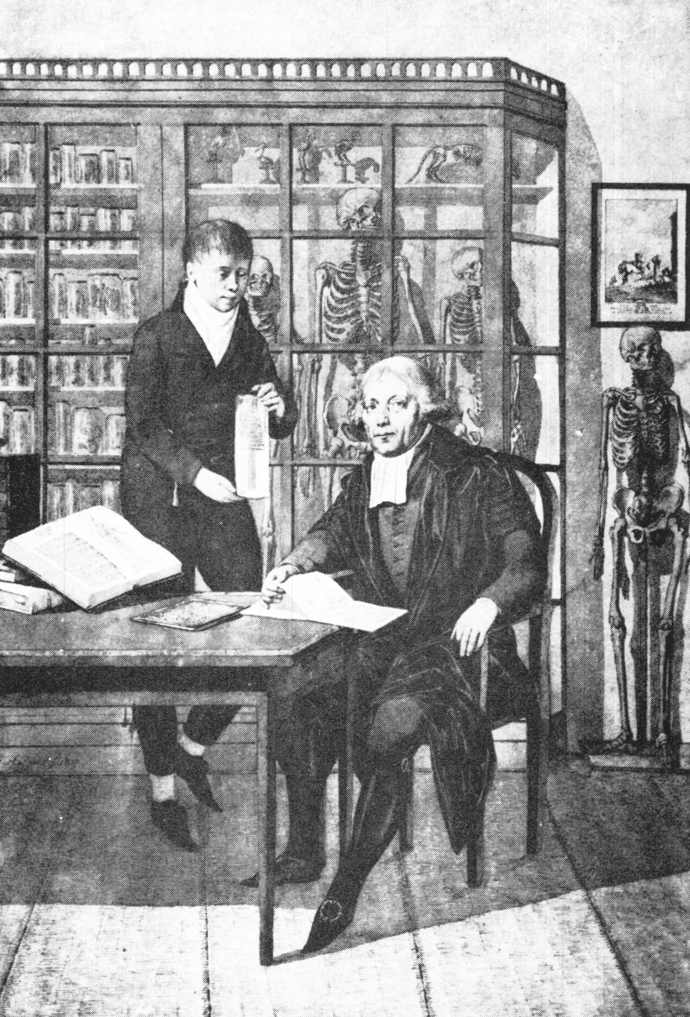 Jan Bleuland (1756–1838) niederländischer Arzt und Kunstfreund